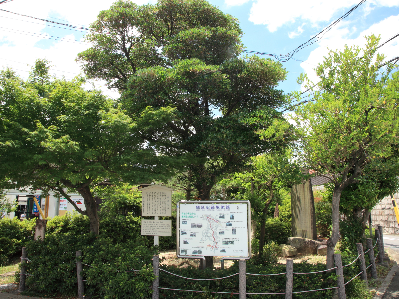 戦評の松（名古屋市緑区、2012年7月）